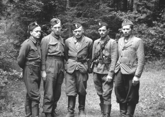 1 kompania samborska (Okręg Stanisławów AK) podczas akcji "Burza". Od lewej: Michał Olszewski, NN, chorąży Adam Ekiert ps. "Pogarda", Jan Pakos ps. "Stal".